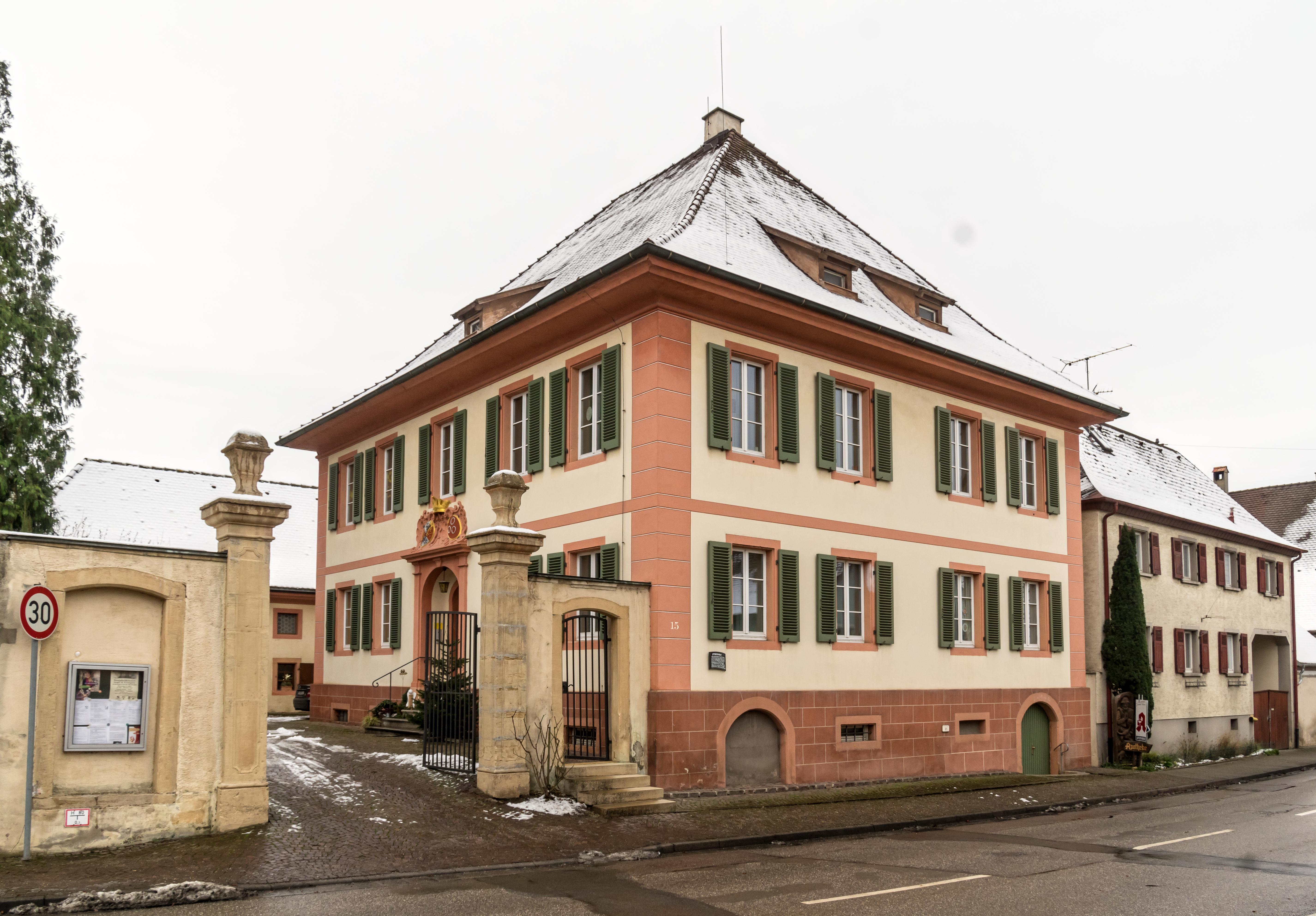 Bilder von der katholischen Kirche St. Remigius in Merdingen Pfarrhaus Merdingen